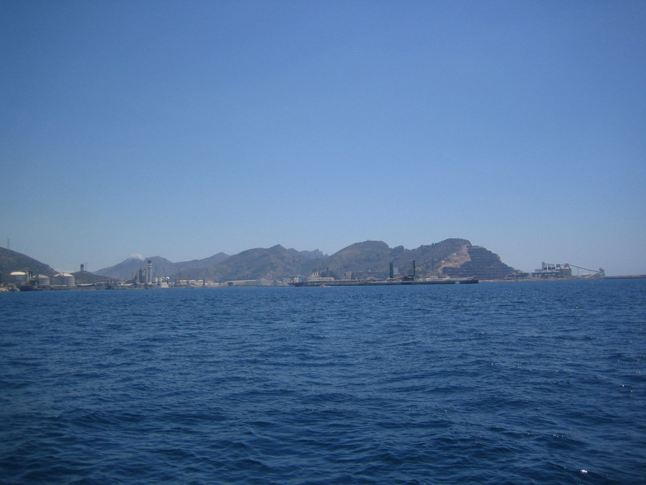 Bahía de Escombreras en el Puerto de Cartagena. Al fondo, la Sierra de la Fausilla, espacio natural protegido.